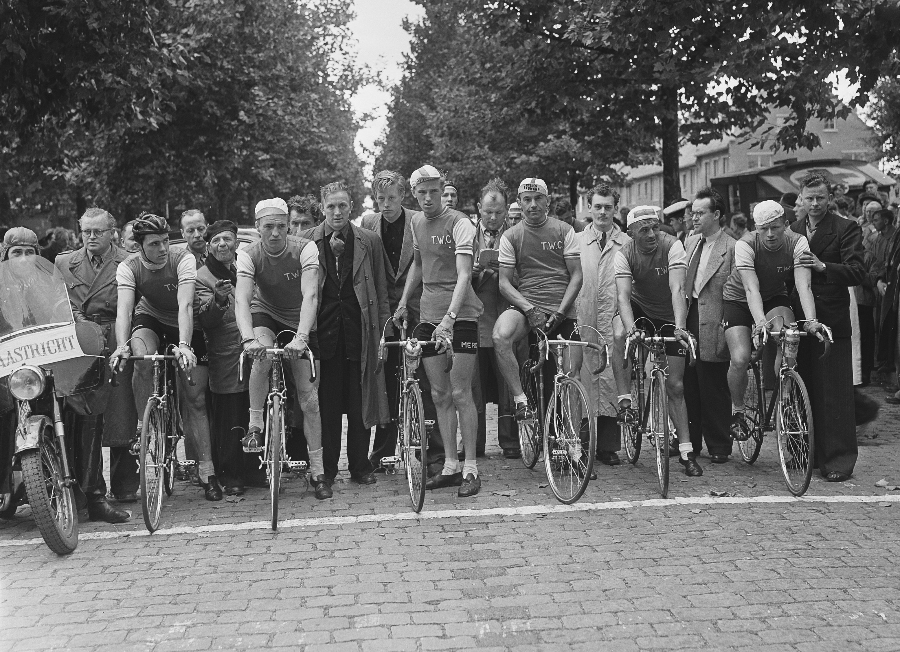 Collectie / Archief : Fotocollectie Anefo Reportage / Serie : [ onbekend ] Beschrijving : Wielrennen clubkampioenschap Eindhoven, TWC Maastricht. v.l.n.r. Piet Haan, Piet van den Brekel, Jan Nolten, Jan Lambrichs, Sjefke Janssen en Henk Stevens Datum : 23 september 1953 Locatie : Eindhoven, Noord-Brabant Trefwoorden : sport, wielrennen Persoonsnaam : Brekel, Piet van den, Haan, Piet, Janssen, Sjefke, Lambrichs, Jan, Nolten, Jan, Stevens, Henk Fotograaf : Bilsen, Joop van / Anefo Auteursrechthebbende : Nationaal Archief Materiaalsoort : Glasnegatief Nummer archiefinventaris : bekijk toegang 2.24.01.09 Bestanddeelnummer : 905-9804